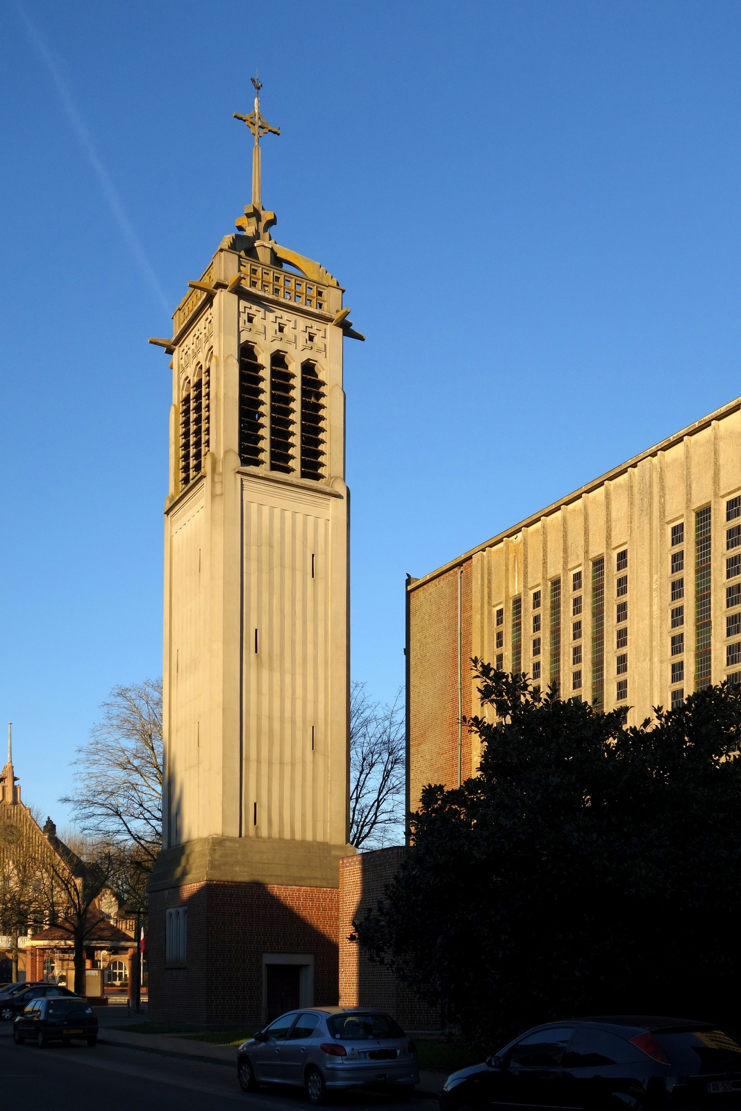 Clocher